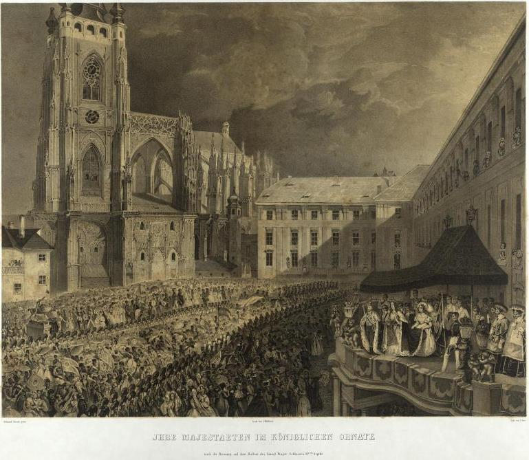 Dvoubarevná, podle předlohlabel QS:Lcs,"Dvoubarevná, podle předloh"